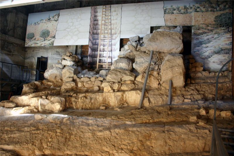 Template:Escavações Arqueológicas das ruínas da Torre